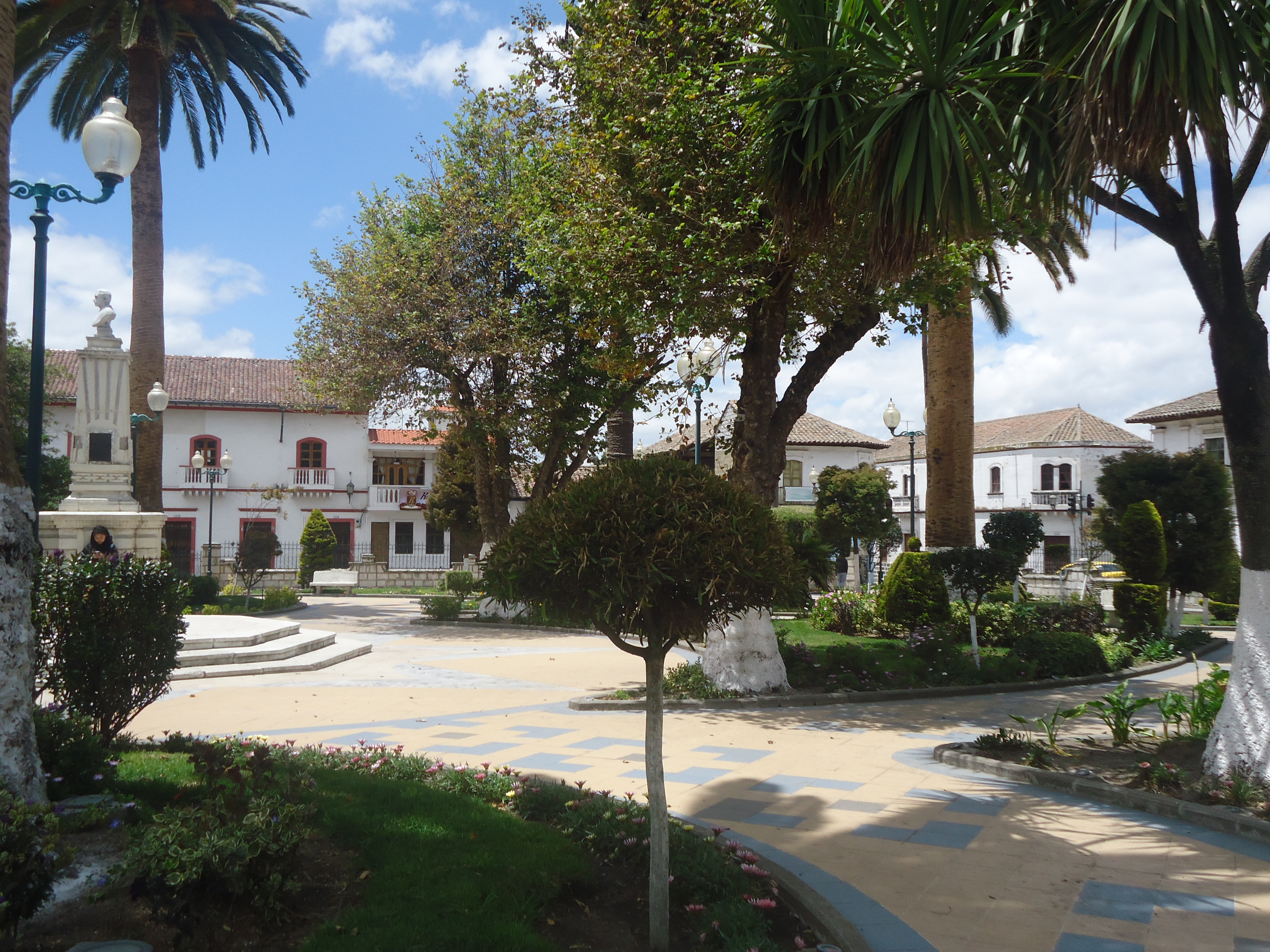 Parque Central Luis Fernando Vivero, Pujilí